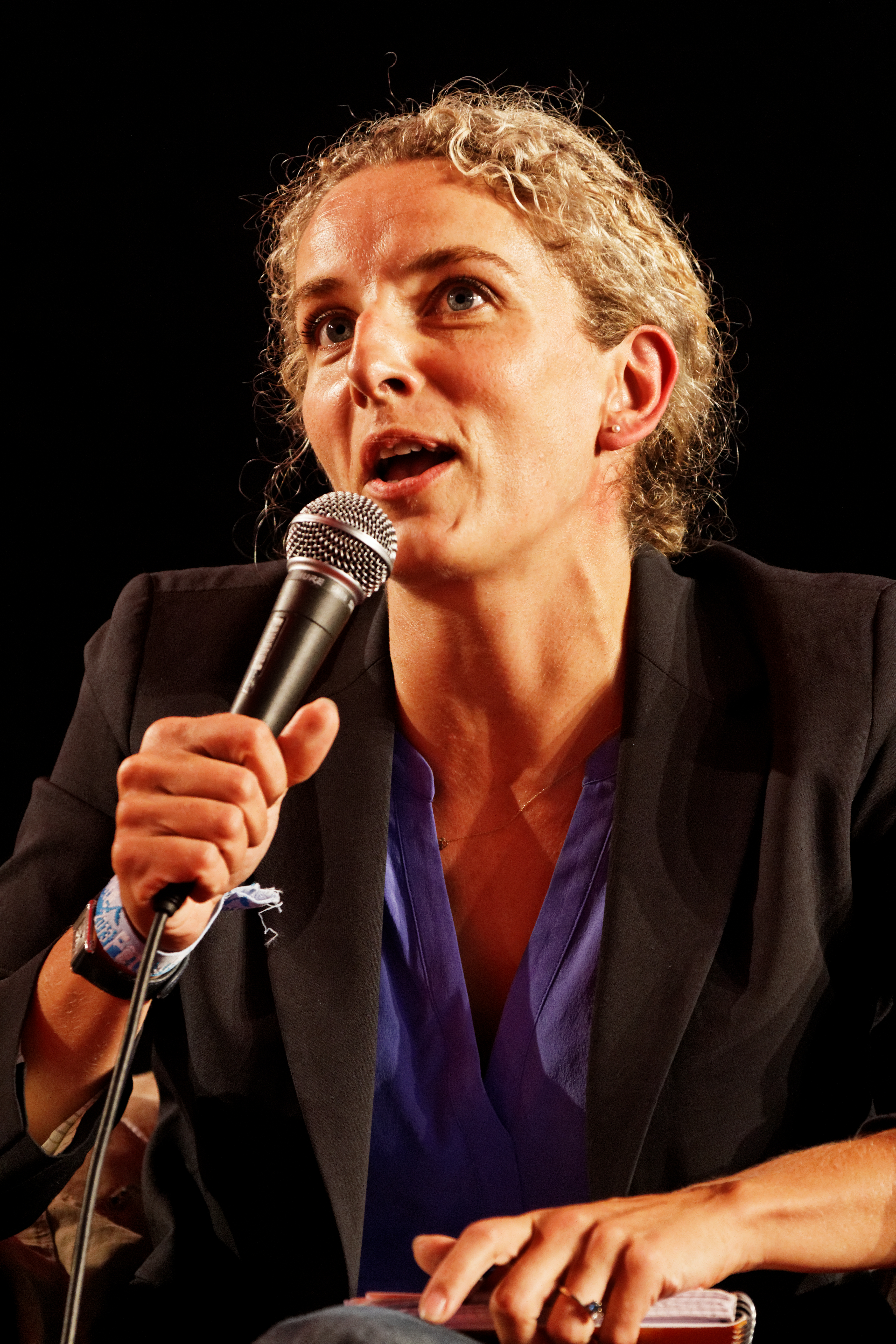 André Chassaigne, Corinne Morel-Darleux, Jérôme Gleizes et Delphine Batho débattent sur la transition écologique à l'Agora lors de la Fête de l'Humanité 2013.